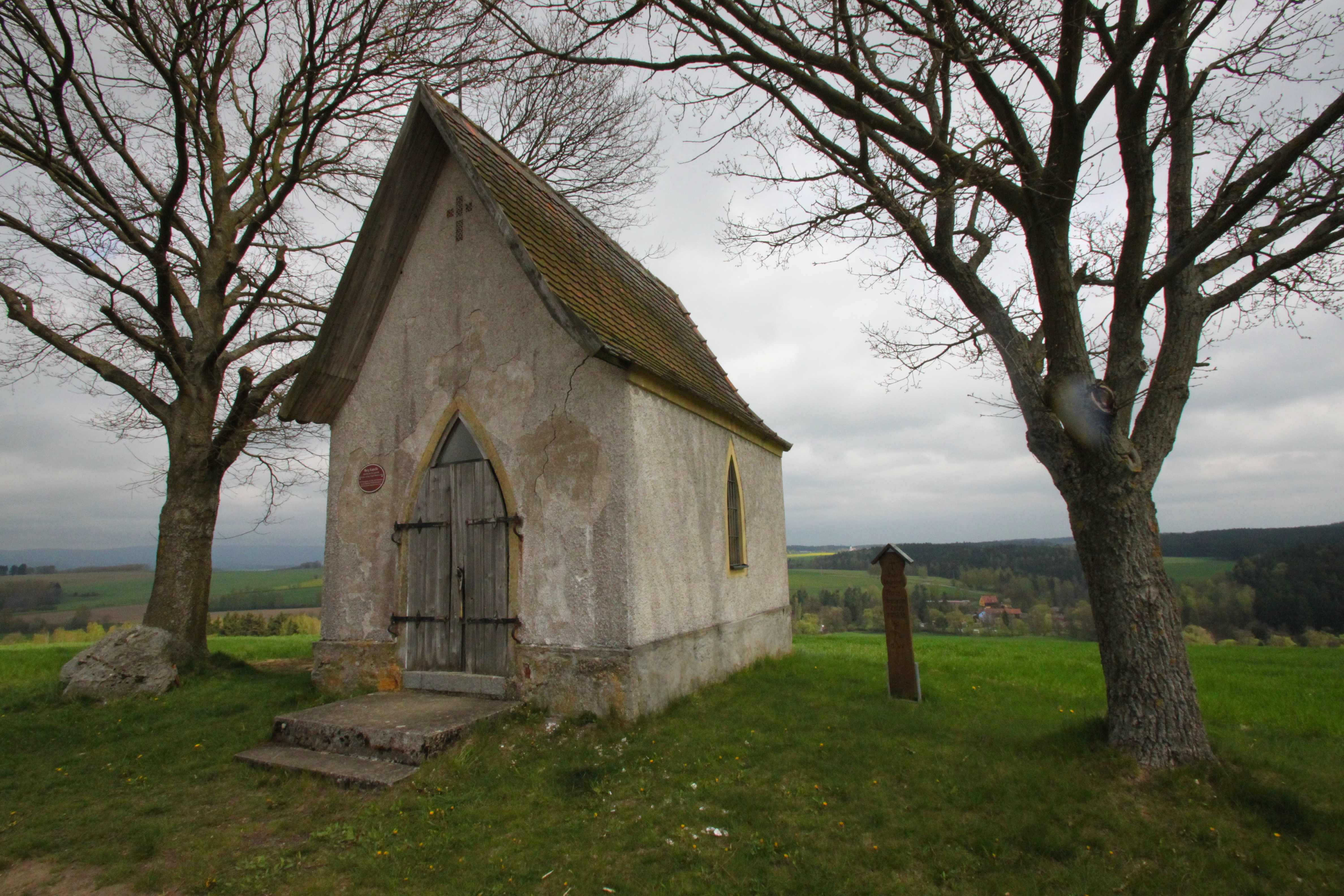 Kapelle Pointzelch, Berg, Windischeschenbach, Baudenkmal D-3-74-168-23